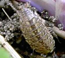 Billede af stribet bænkebider (Philoscia muscorum). Udgivet under GFDL.